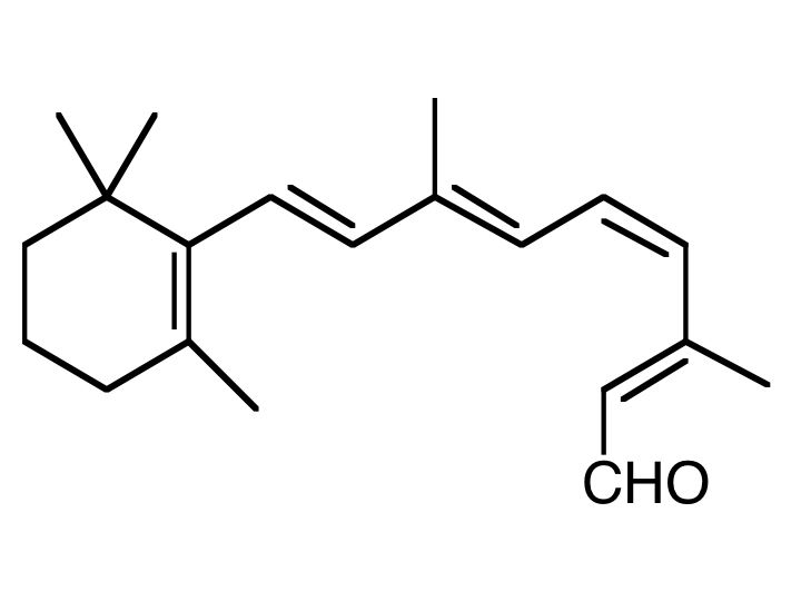 Struttura della 11-cis retinaldeide